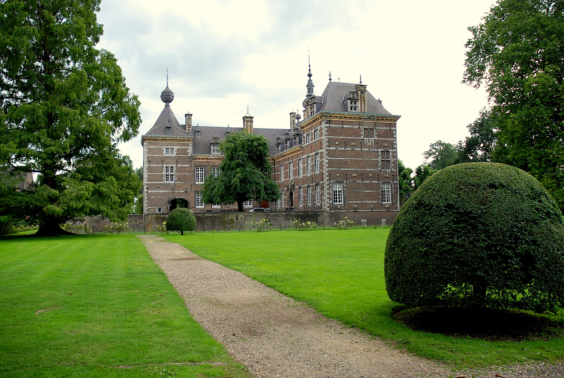 Kasteel Eijsden te Eijsden, Nederland